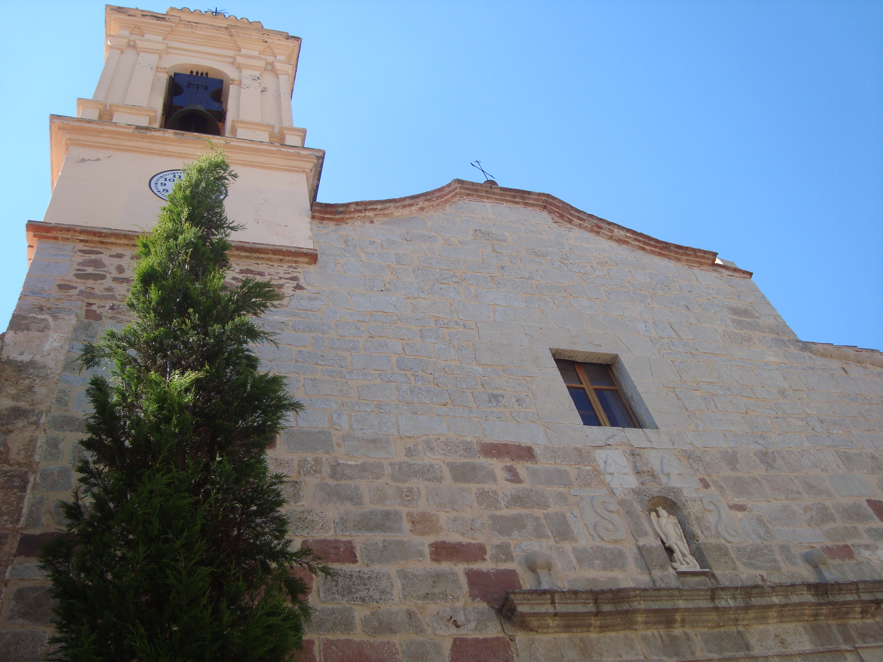 Església parroquial de Sant Miquel Arcàngel (la Pobla Tornesa) 05.094-001.